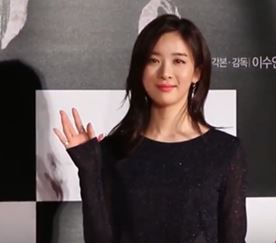 2월 3일 영화 '해빙' 제작보고회 현장